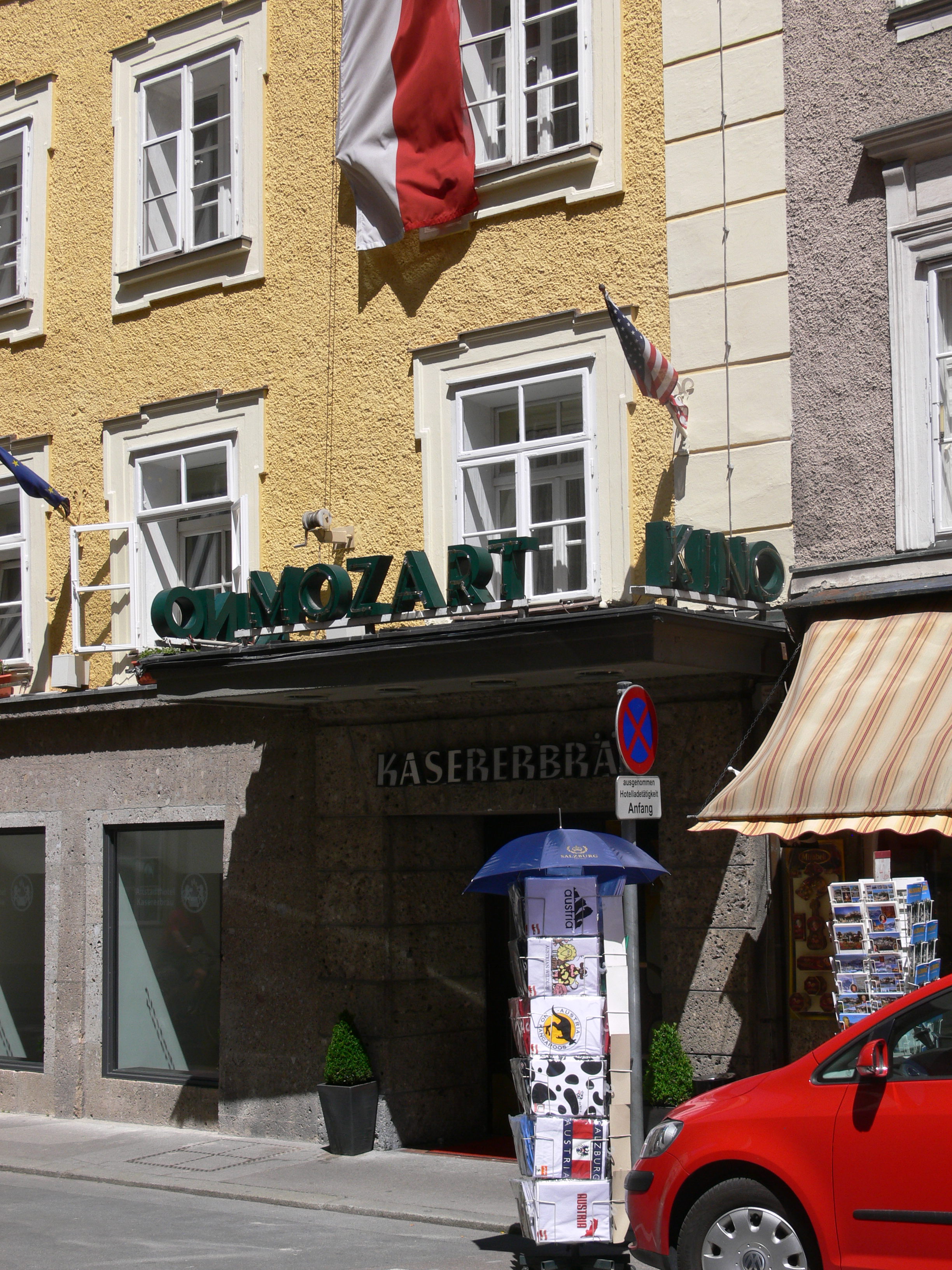 Kino Mozart, Salzburg